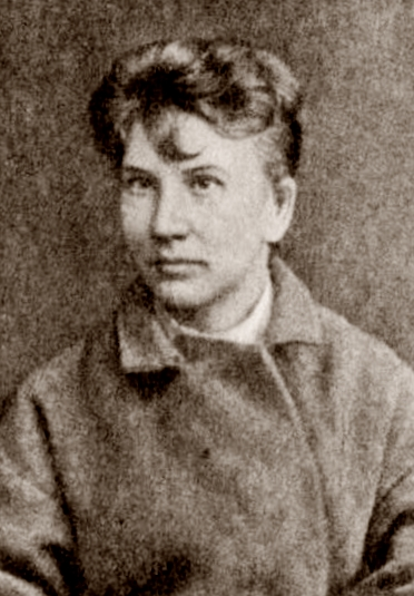 Anna Vasil'evna Jakimova